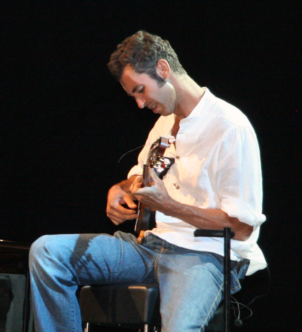 l'attore italiano Paolo Kessisoglu al Festival Teatro Canzone Giorgio Gaber 2008 di Viareggio.